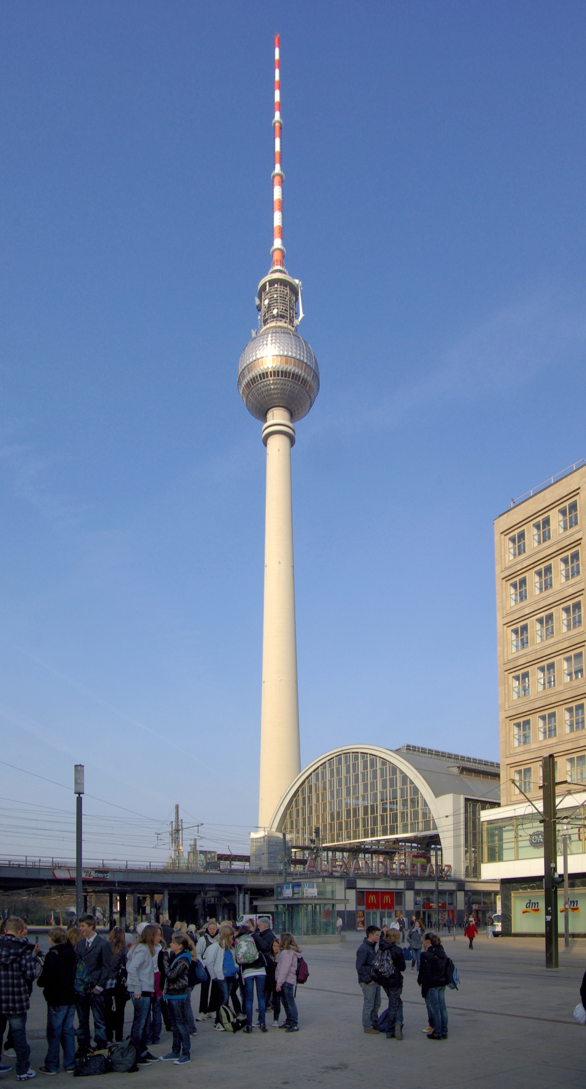 Berlin, Alexanderplatz, Bahnhof